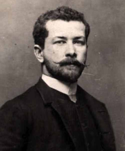 Степан Бакалович